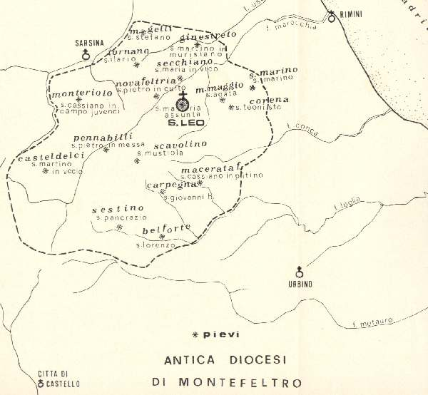 cartina millenaria del Montefeltro